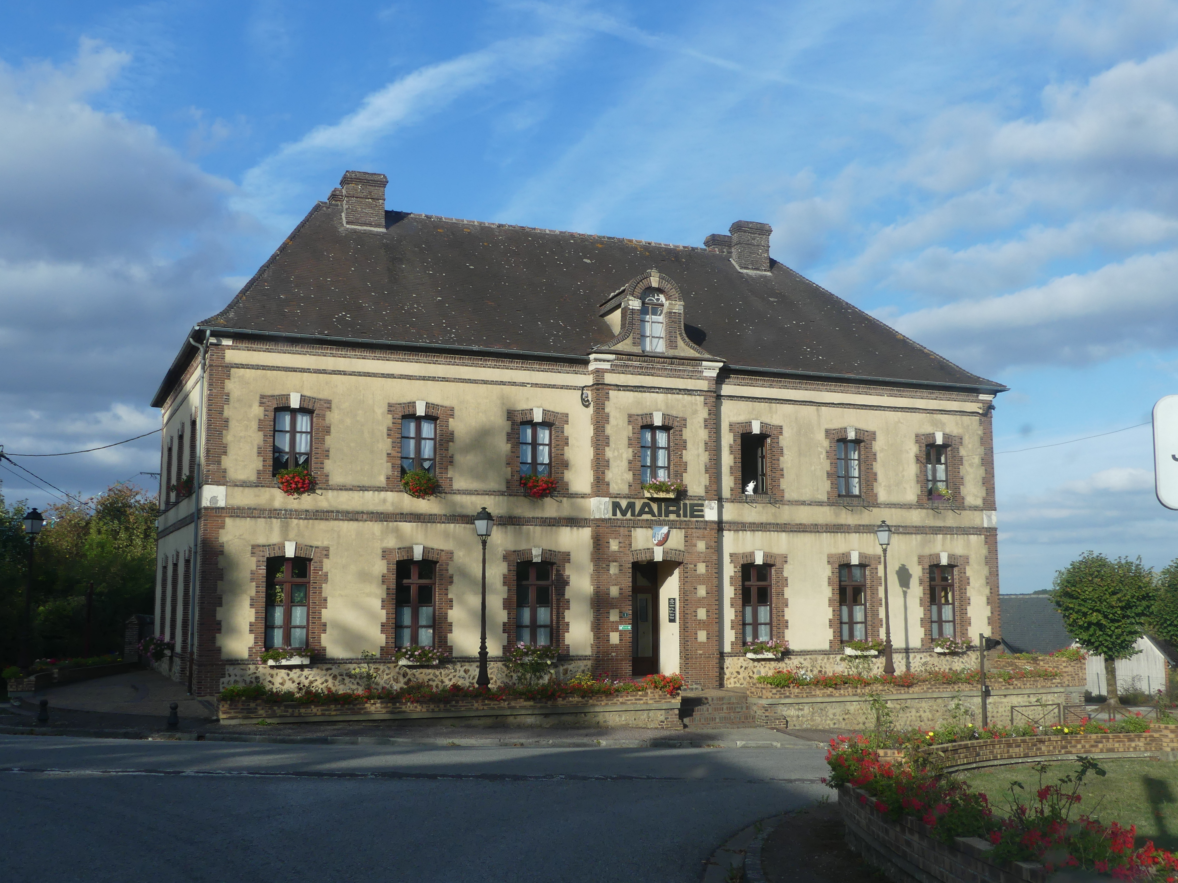 en contre-bas au carrefour à feu tricolore